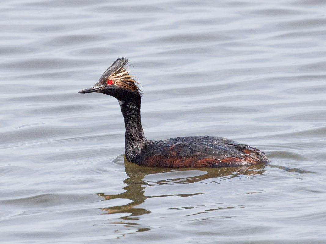 Tule Lake, Siskiyou Co., CA USA June 22